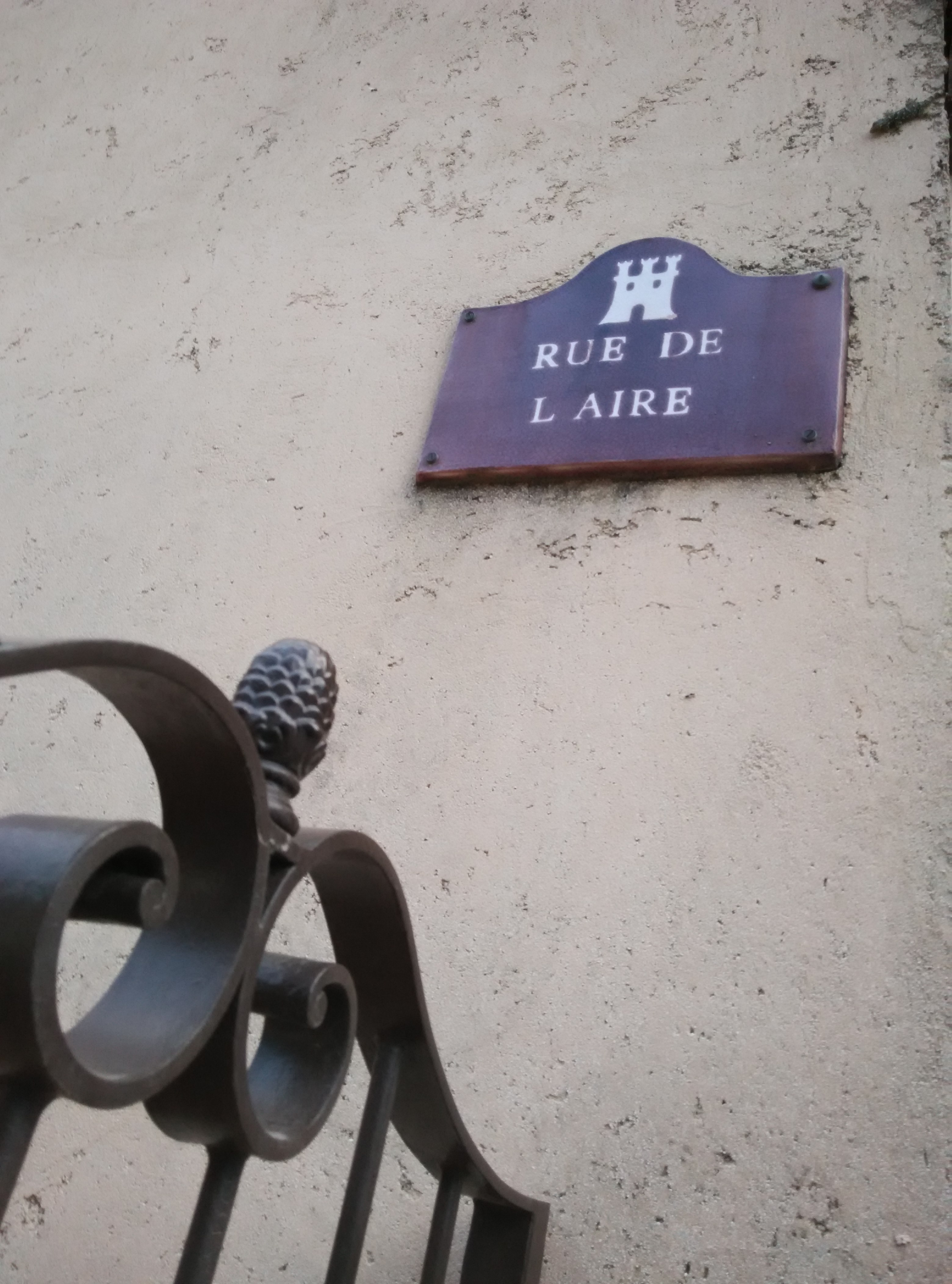 Plaque de la rue de l'Aire au nouveau village de Gassin